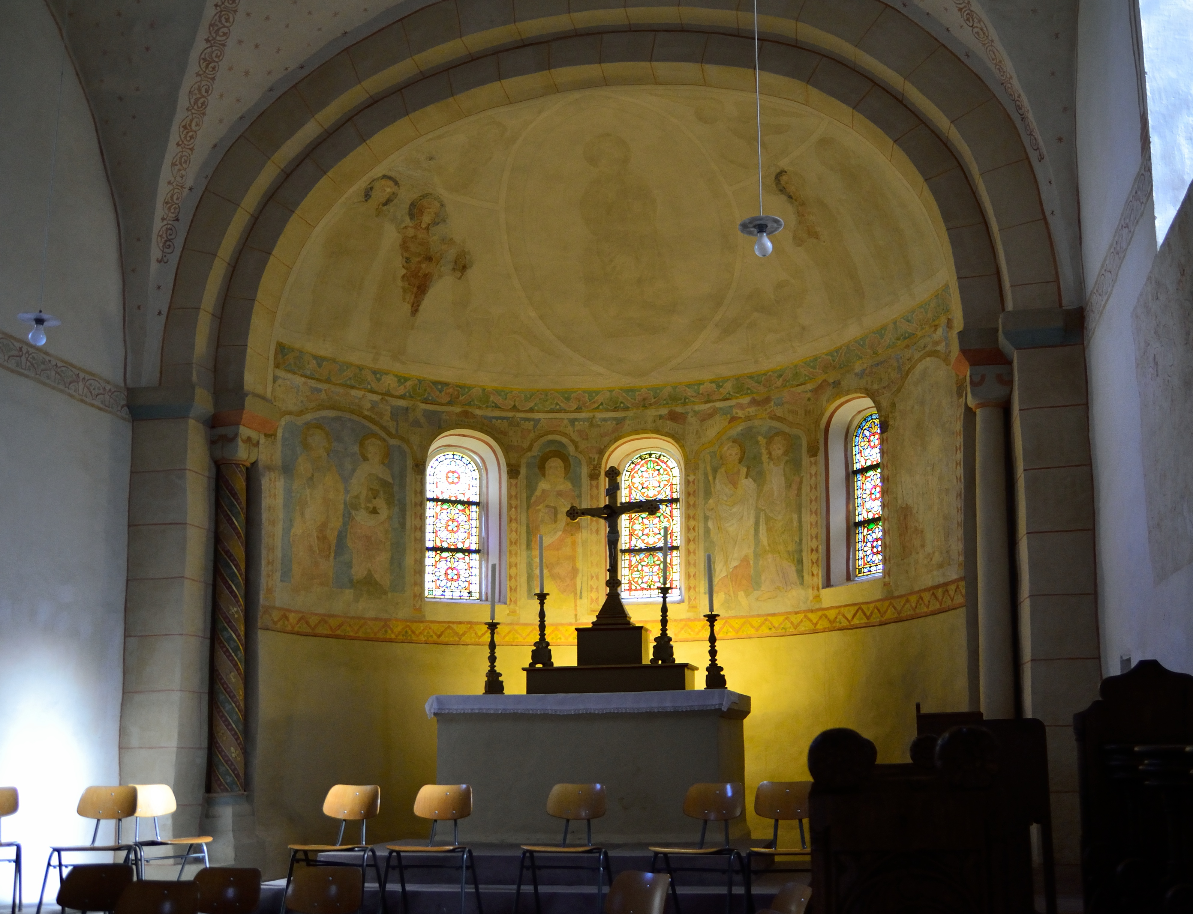 This is a photograph of an architectural monument. Kilianskirche (Lügde); Apsis mit Majestas Domini